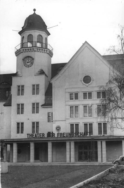 Berlin, Theater der Freundschaft Illus Rudolph Hein.Jst. Theater der Freundschaft. Am 16.11.1950 wird das Theater der Freundschaft, Berlin-Lichtenberg, Parkaue 25, mit dem Theaterstück Du bist der Richtige eröffnet. Intendant des neuen Theaters ist Hans Rodenberg. UBz: Außenansicht.